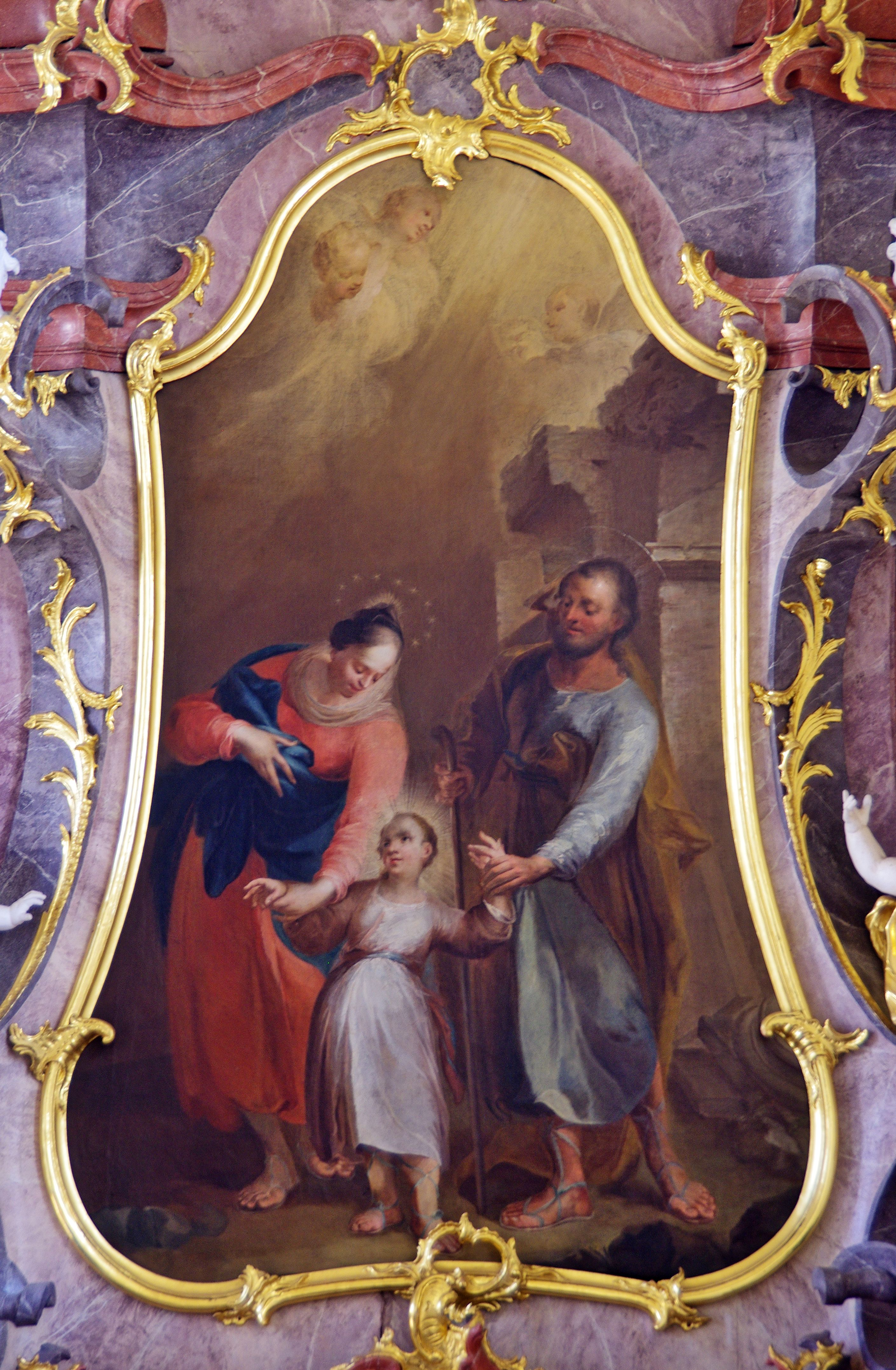 Die katholische Kirche St. Jakobus in Stegen-Eschbach